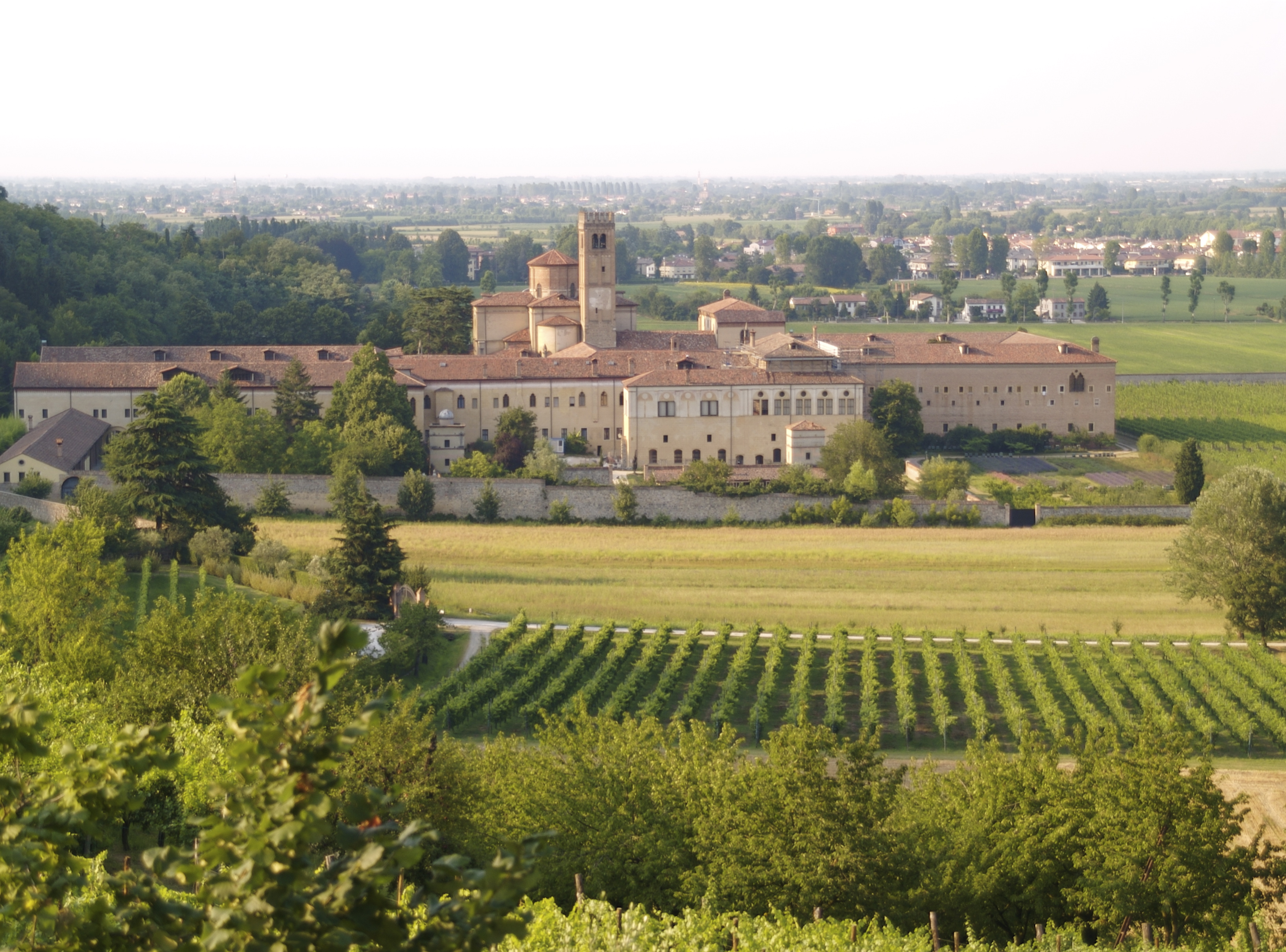 Retreat, Abbazia di Praglia